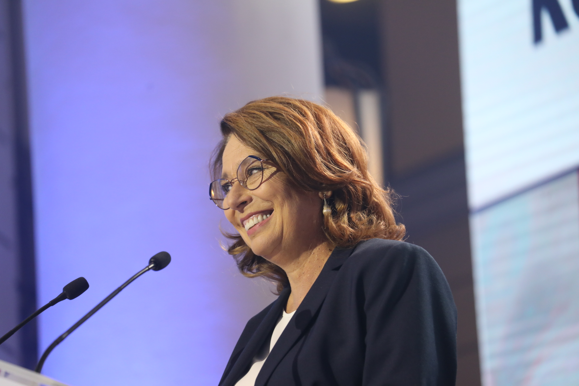 Zdjęcie Małgorzaty Kidawy-Błońskiej przemawiającej na konwencji Koalicji Obywatelskiej